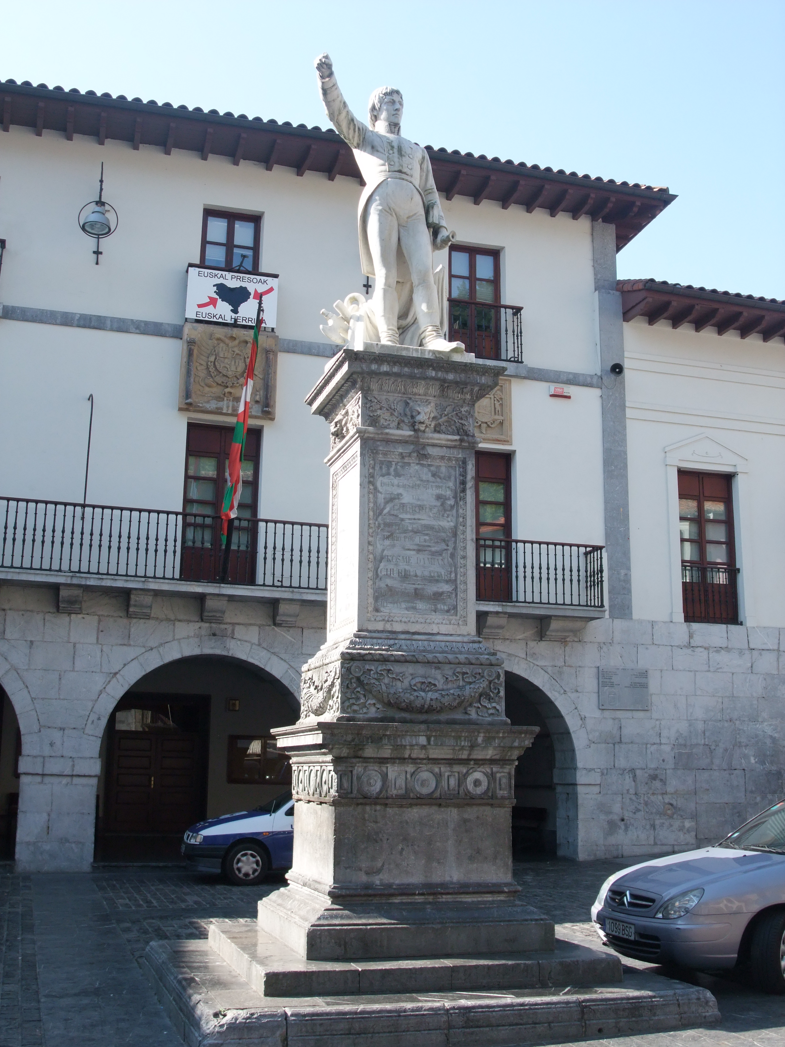 Mutriku (Guipúzcoa)-Monumento a Cosme Damián Churruca, marino fallecido en la batalla de Trafalgar